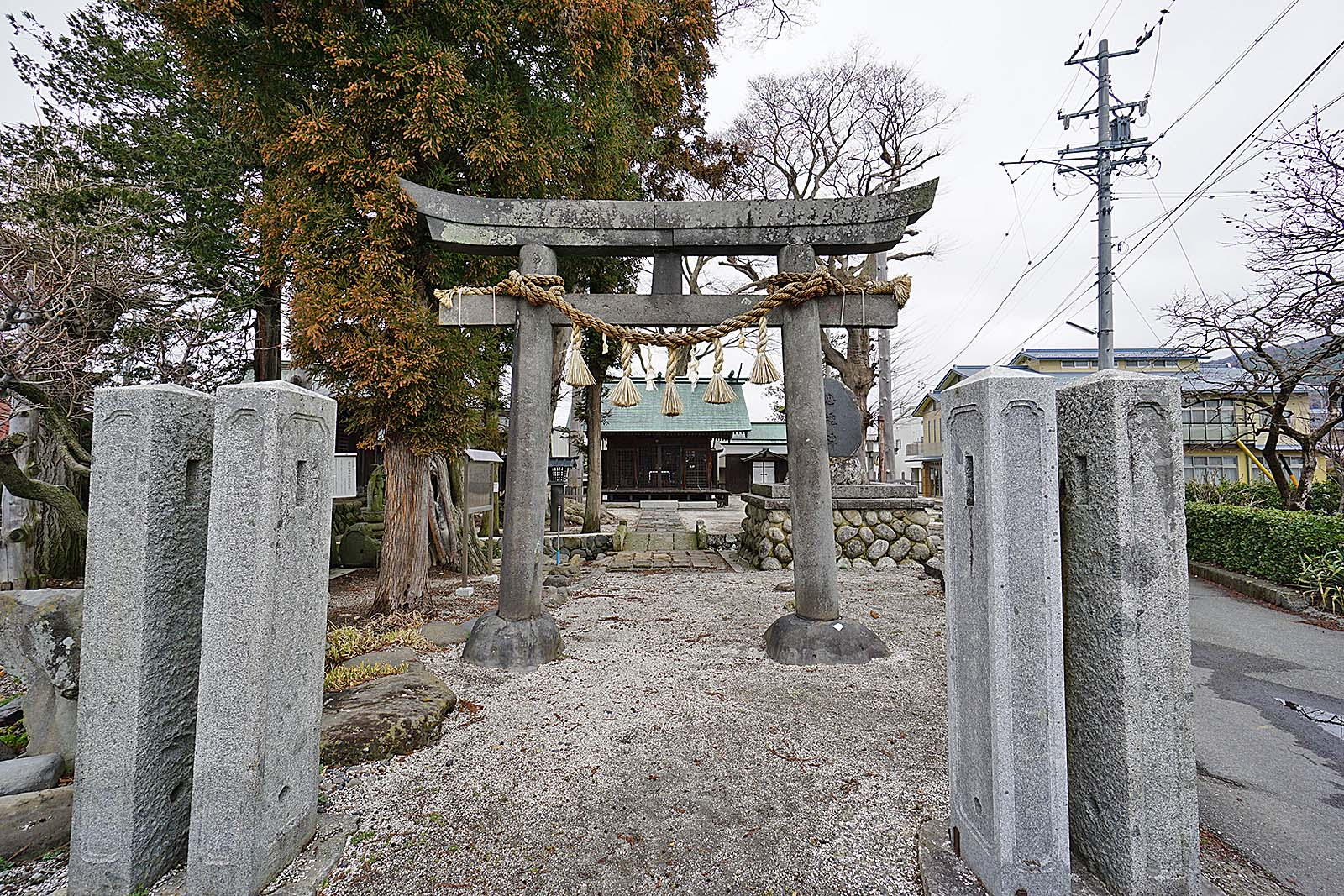 Tatsuya-Sukura Shrine , 達屋酢蔵神社